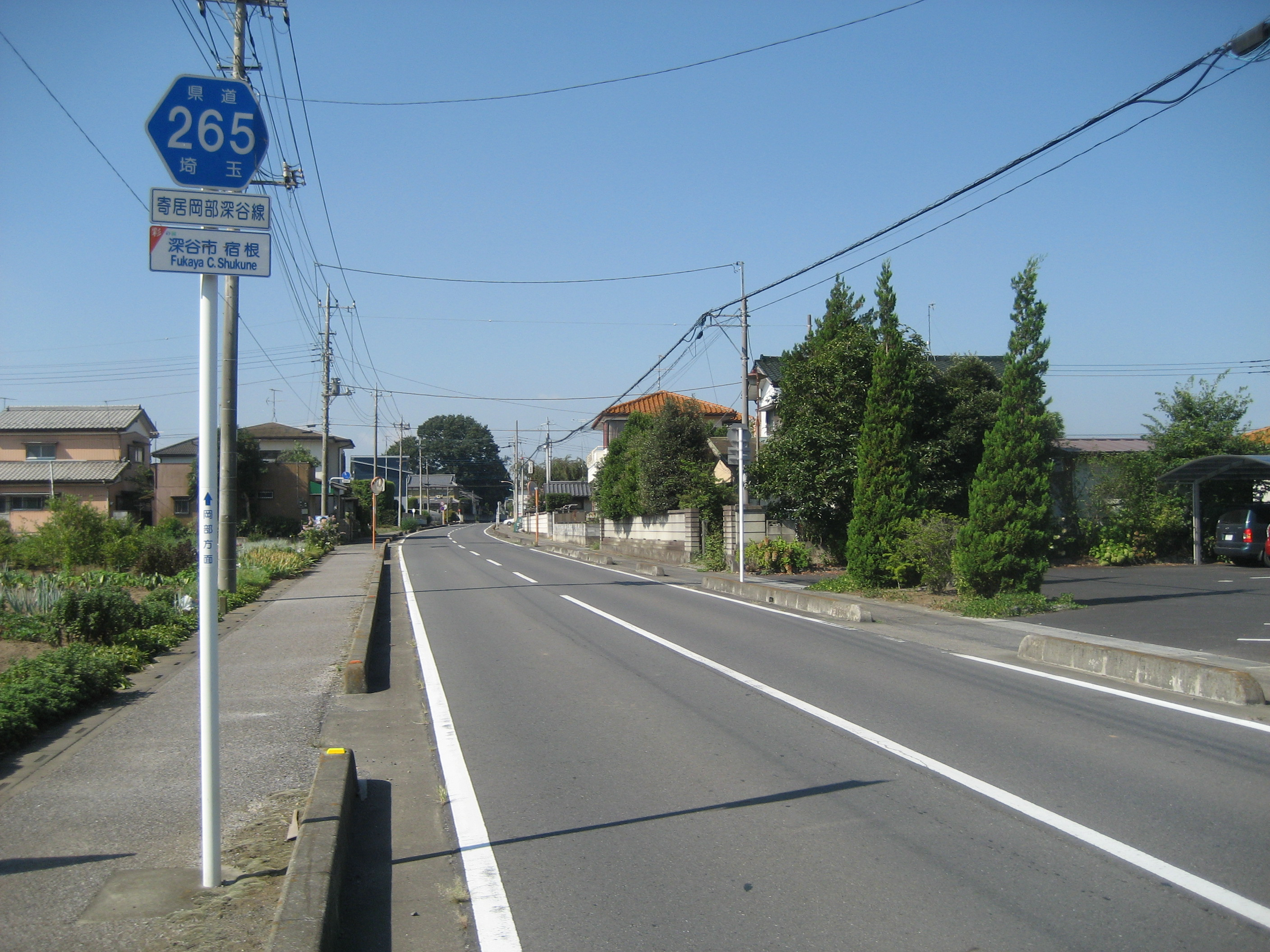 埼玉県道265号線深谷市宿根付近